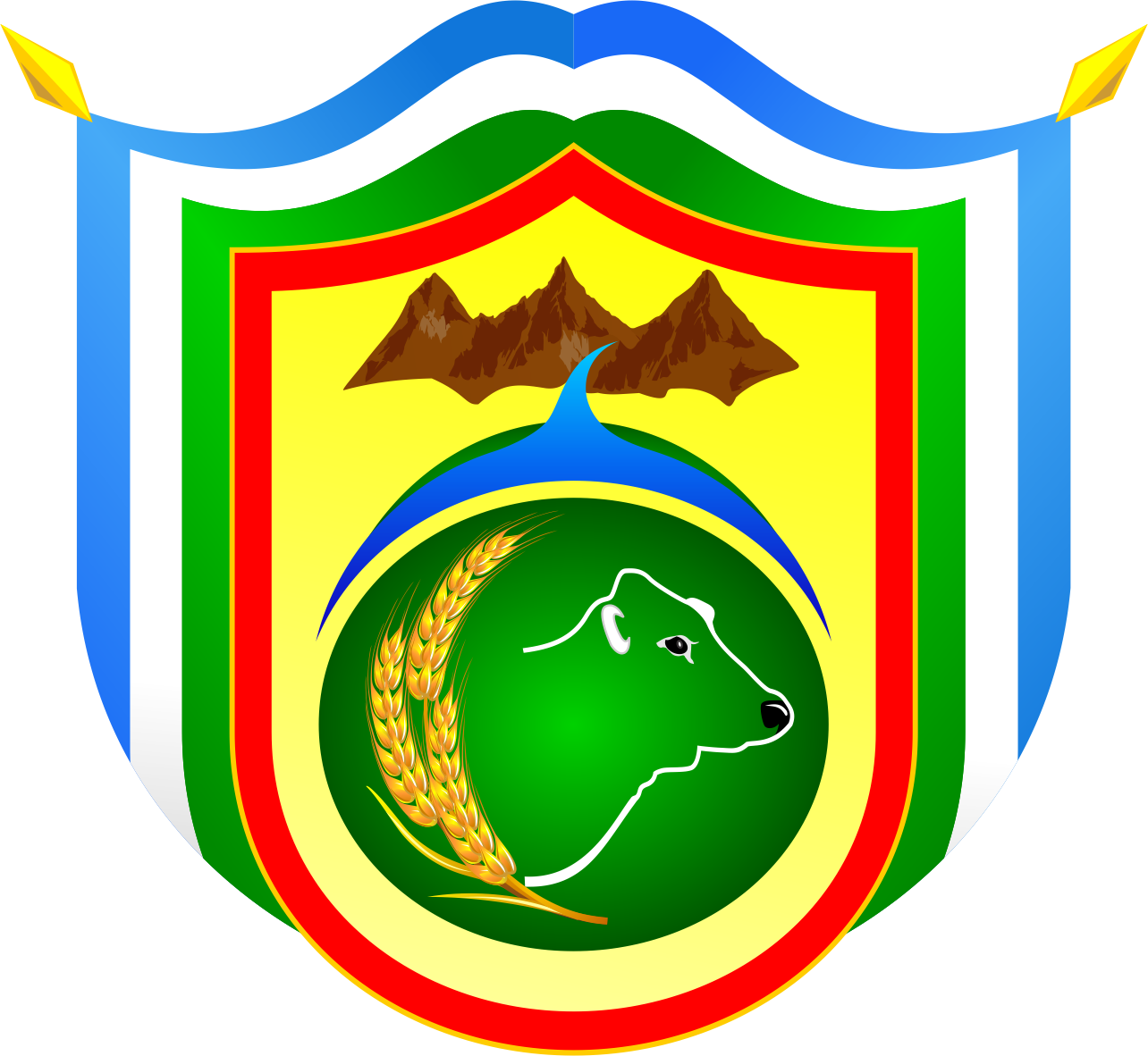 Distrito de Cupi - Provincia de Melgar - Región Puno